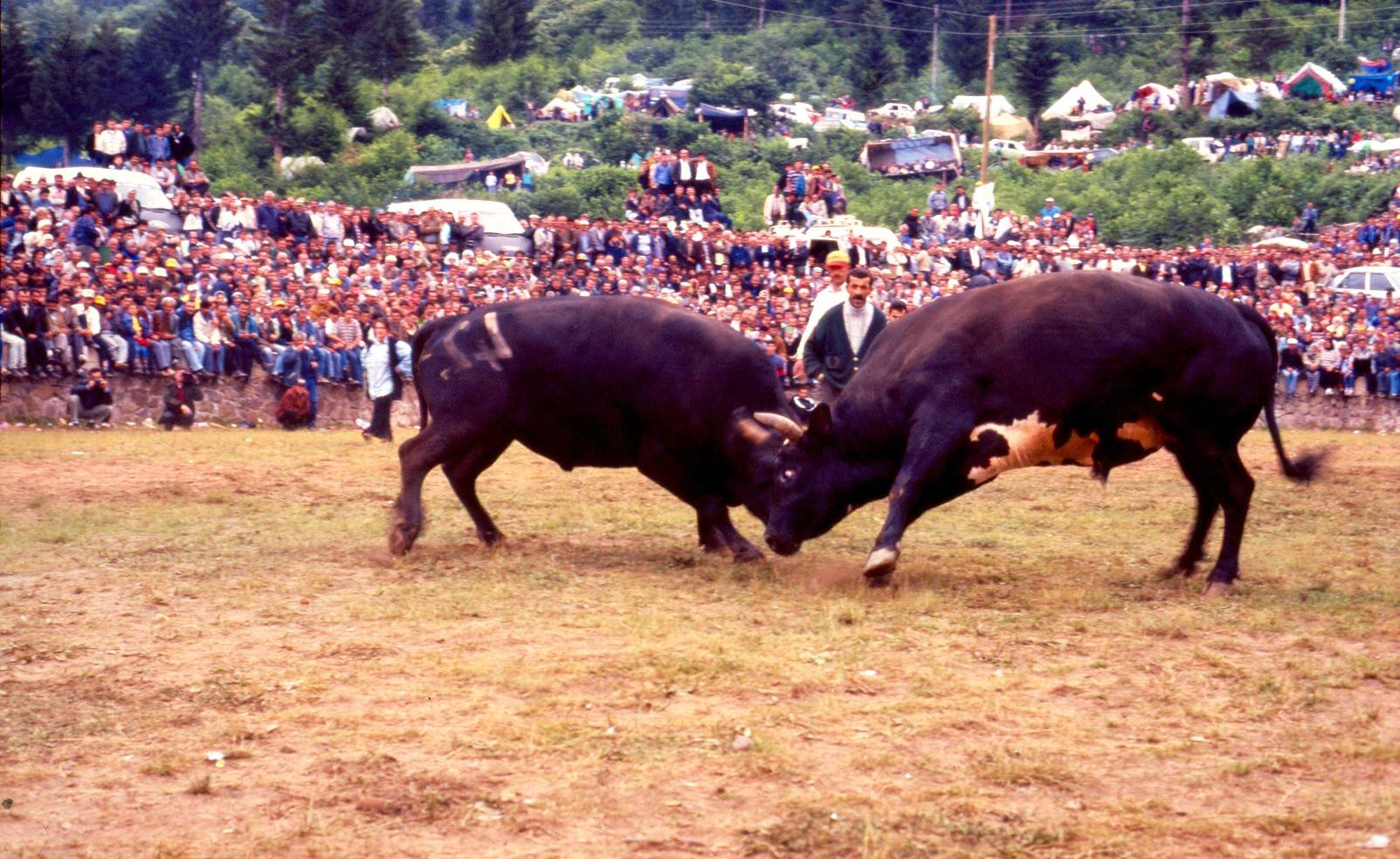 Er Meydanı